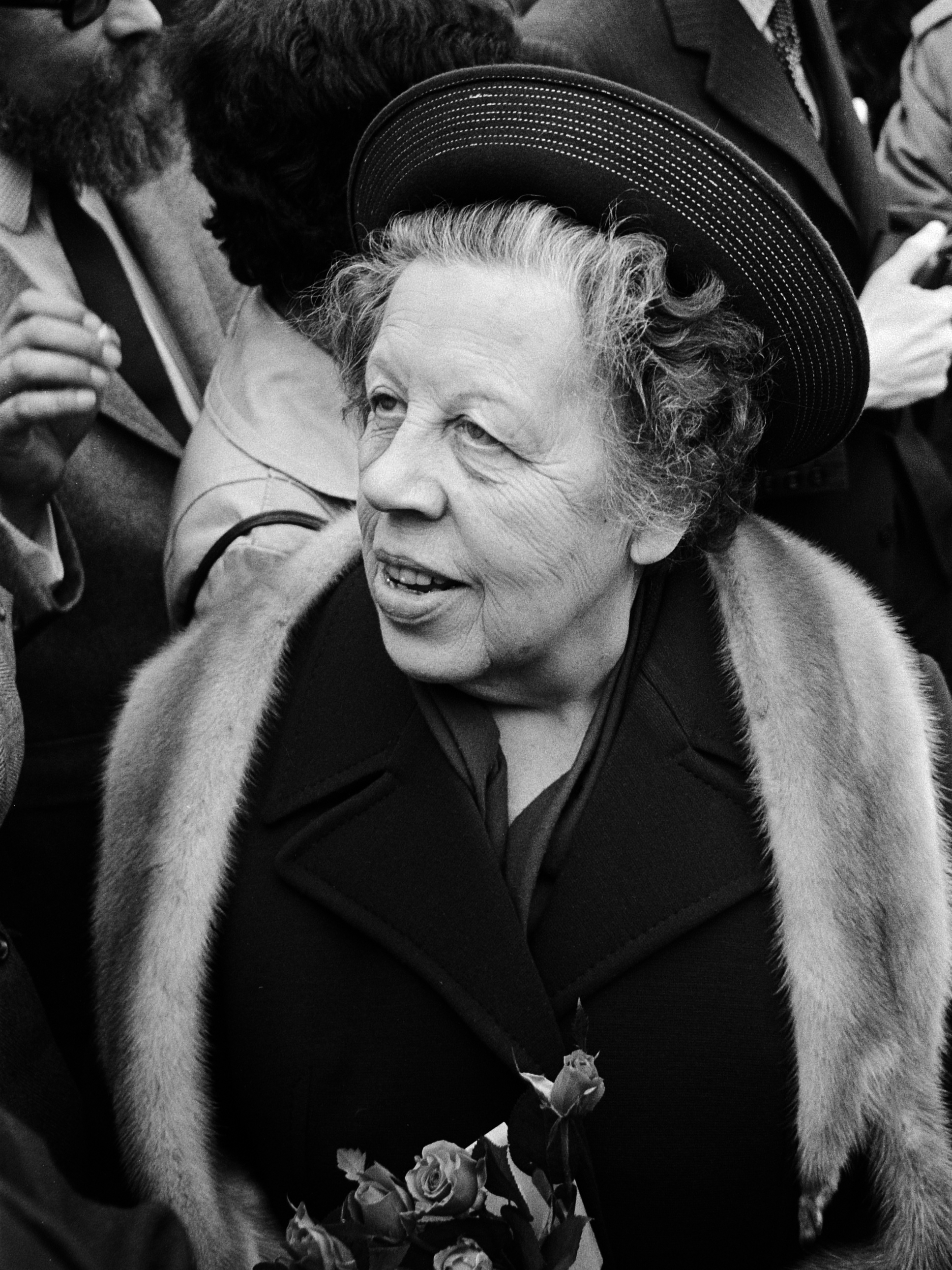 Verkiezingstournee van de Christelijk-Historische Unie (CHU) in het kader van de Tweede Kamerverkiezingen 1971 in Amsterdam; C.W.I. Wttewaall van Stoetwegen 20 april 1971